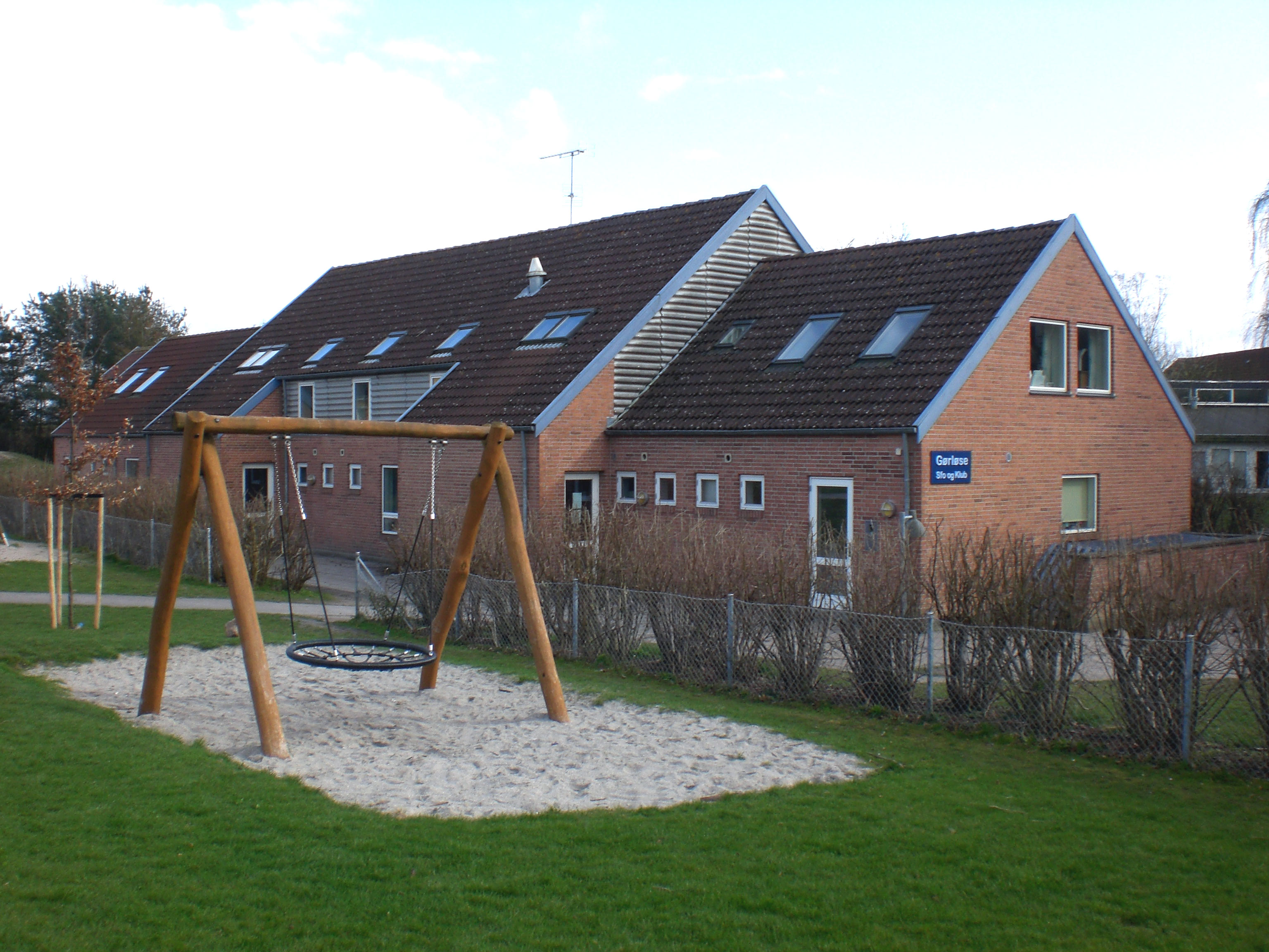 Gørløse SFO